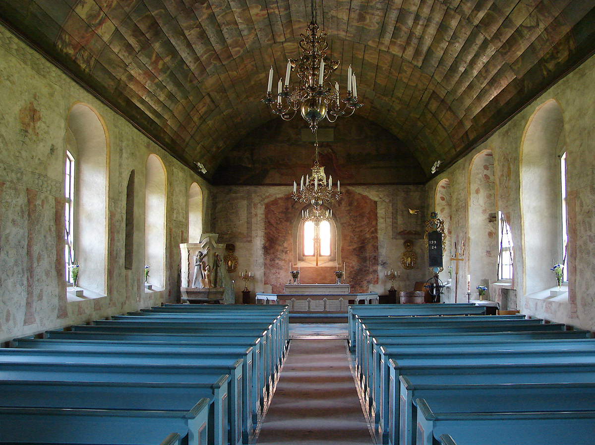 Sankt Laurentii kirke, Sankt Lars' kirke, Halland, interior